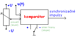 Bloková schéma obvodu synchronizácie v analógovom osciloskope. Licensing Kategória:Obrázky schém